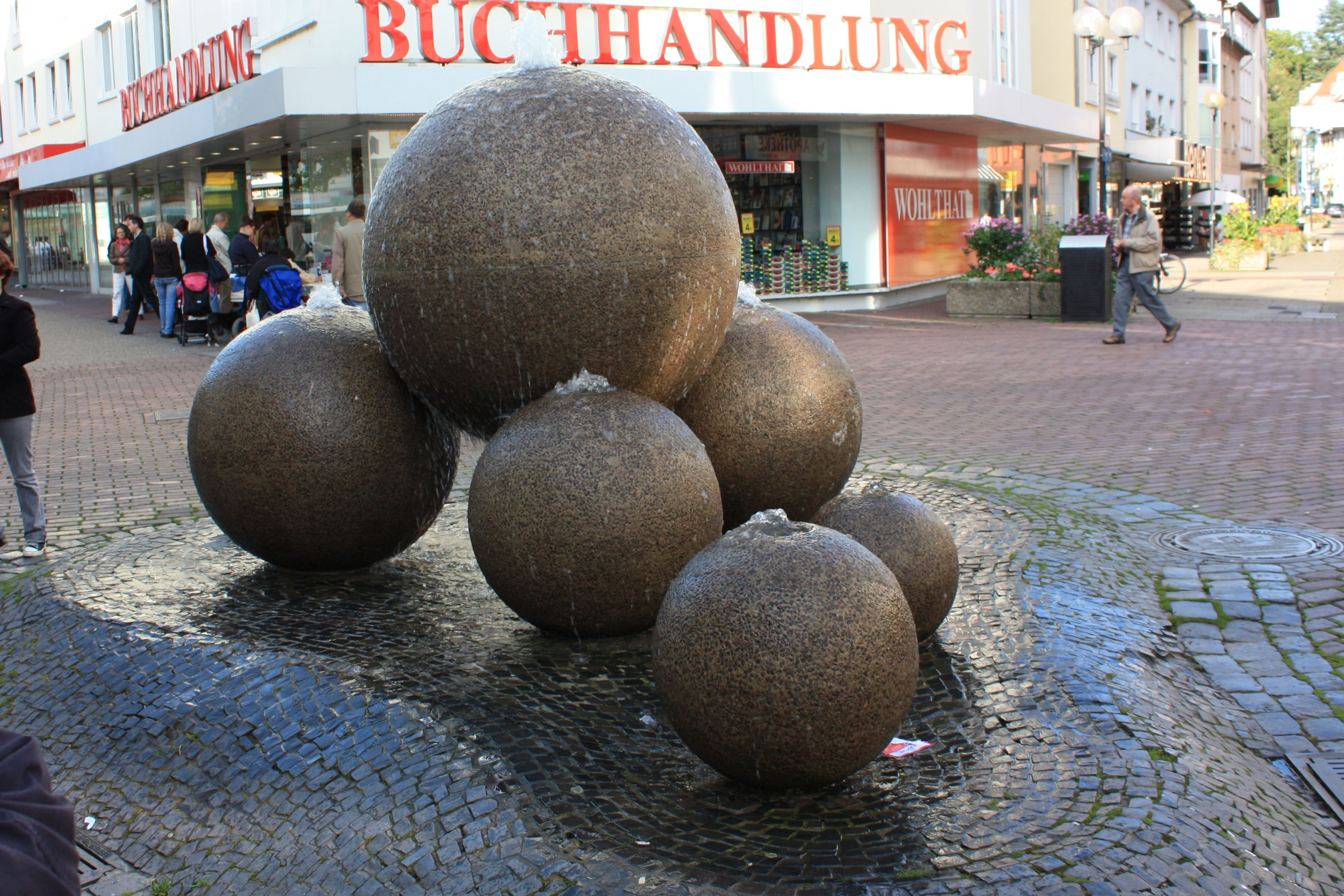 Der von Ruth Leibnitz 1977 gestaltete Kugelbrunnen in Gießen, Hessen